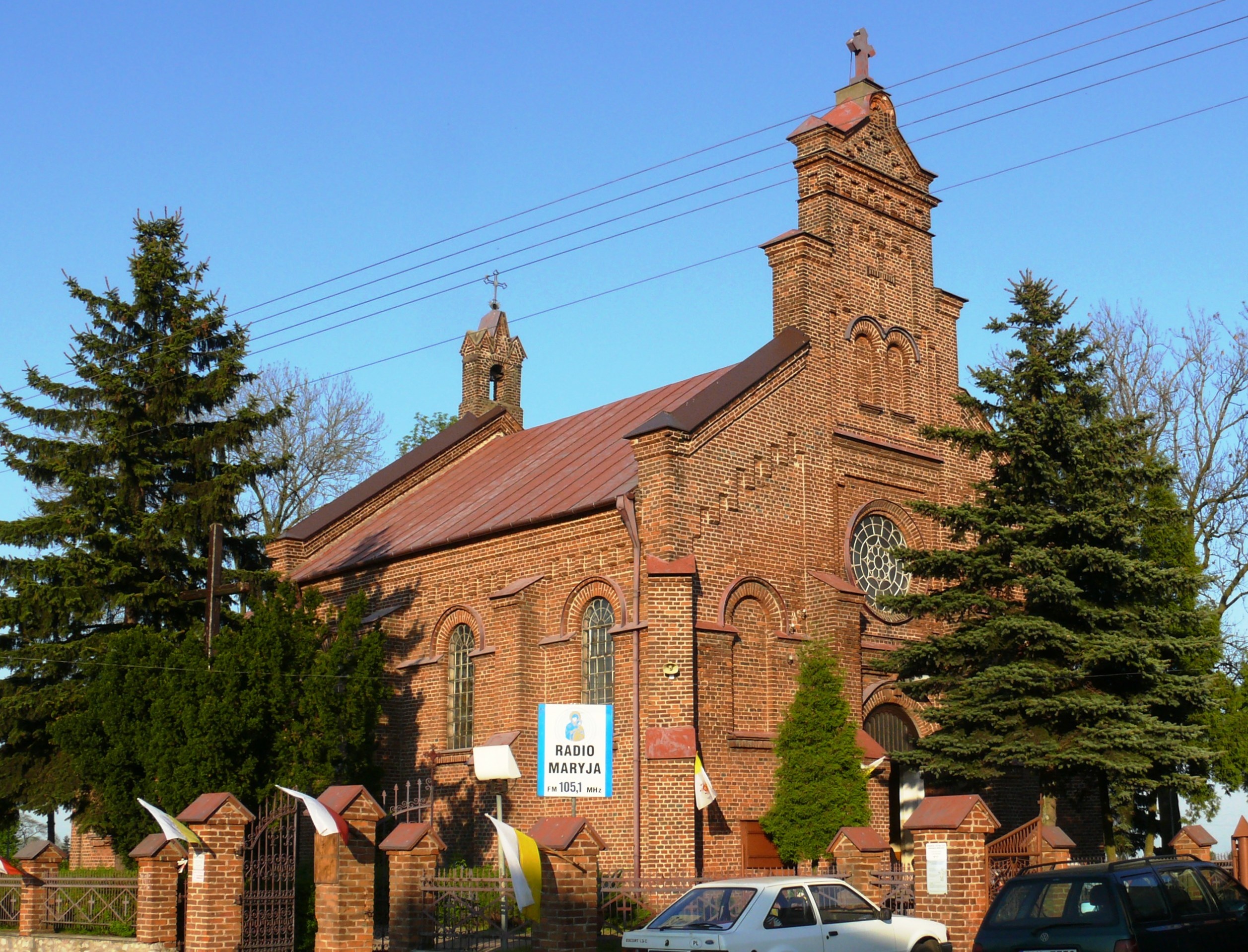 Kościół Świętego Jakuba Apostoła we Wrzący Wielkiej